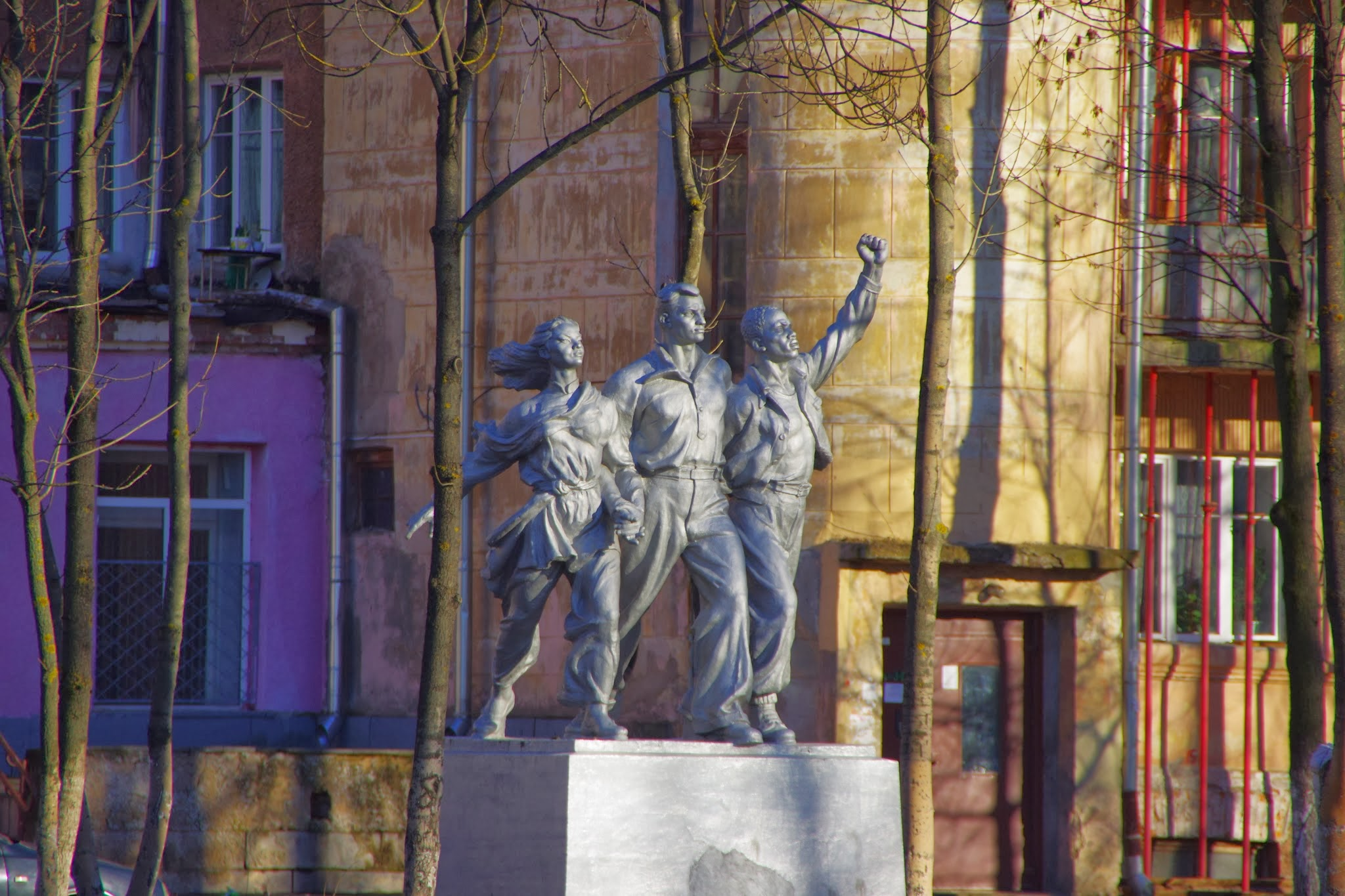 Pieršamajski rajon, Viciebsk, Belarus